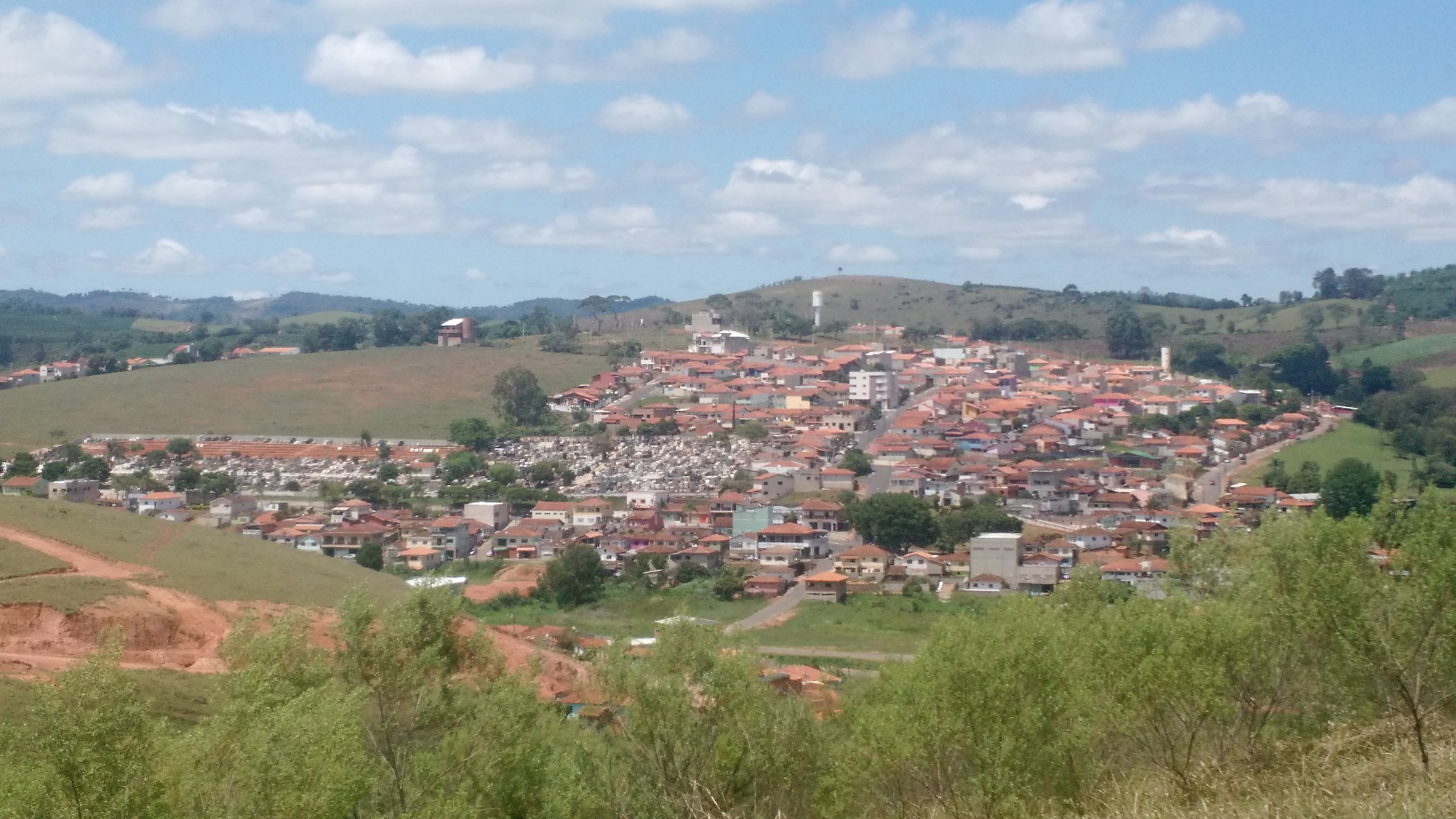 Campestre MG BR